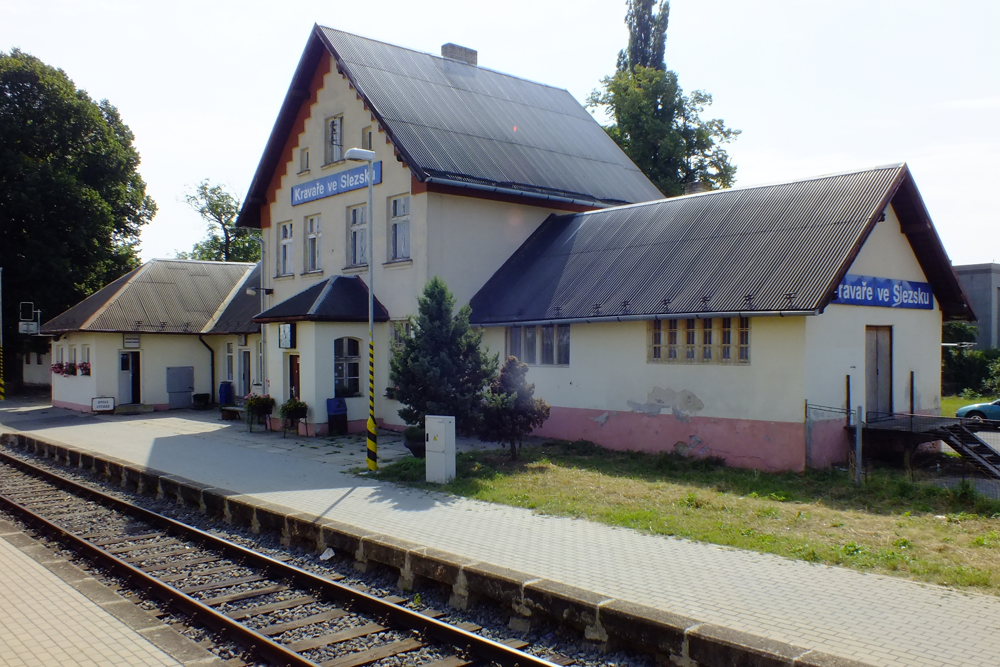 Staniční budova v Kravářích